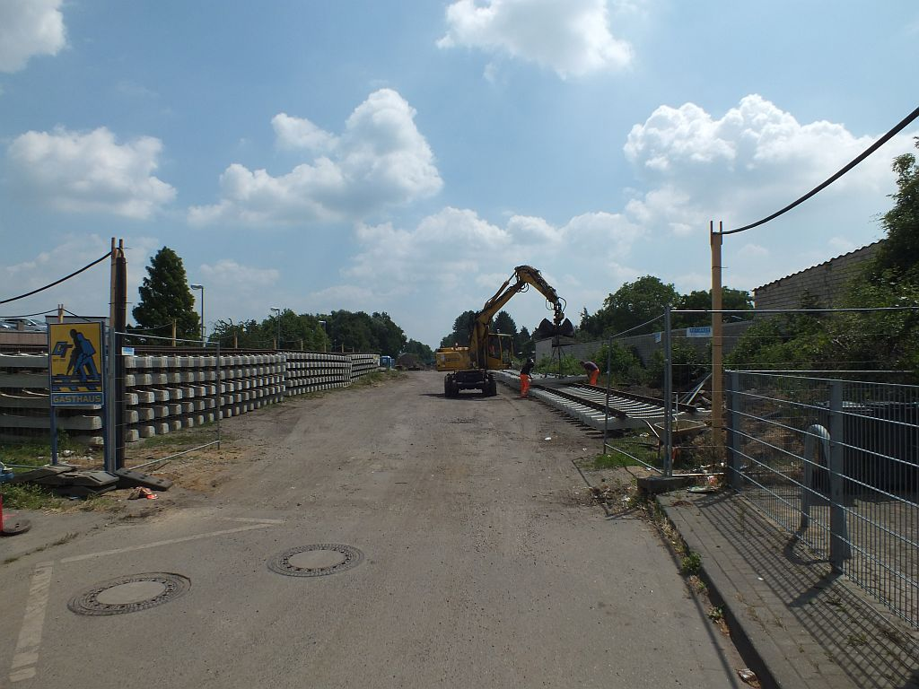 Reaktivierung Bahnhof Heinsberg